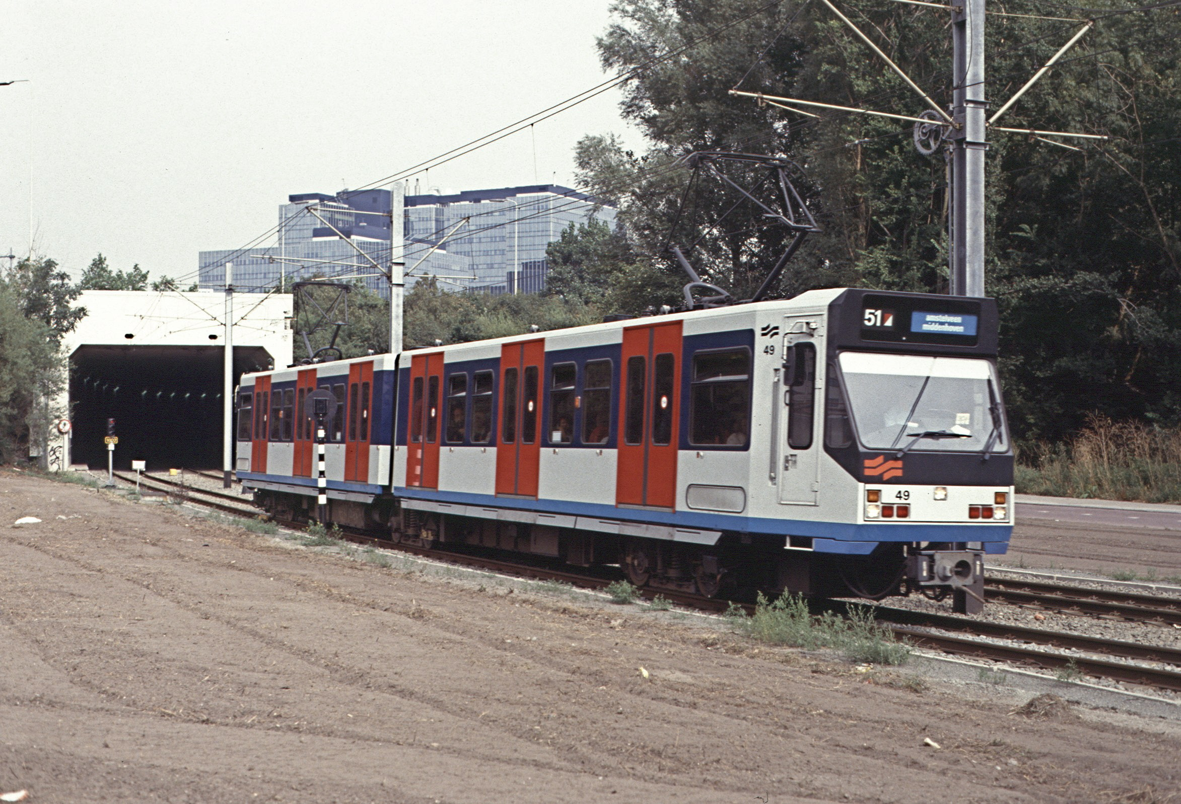 Sneltram nach Amstelveen in Amsterdam Zuid